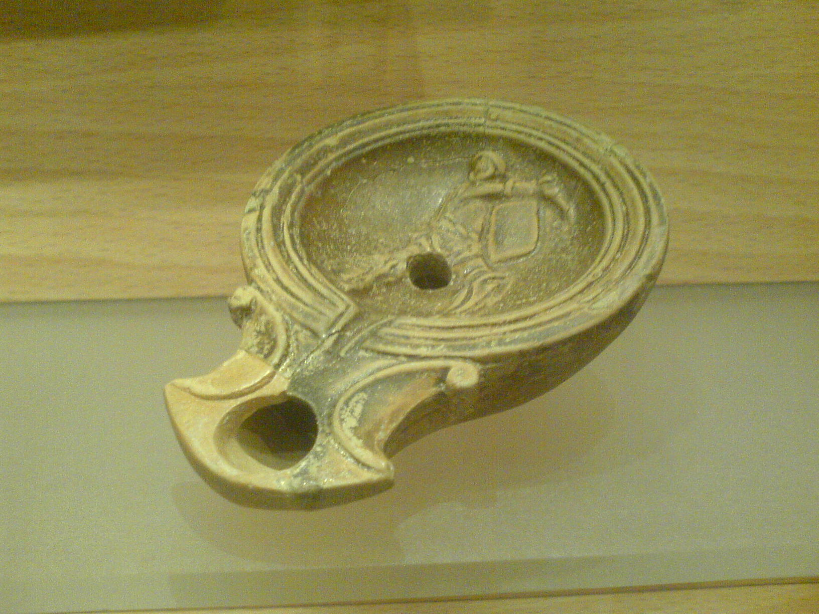 Lampe à huile romaine. Céramique, Ier-IIe siècles. Museu d'historia de la ciutat, Barcelone